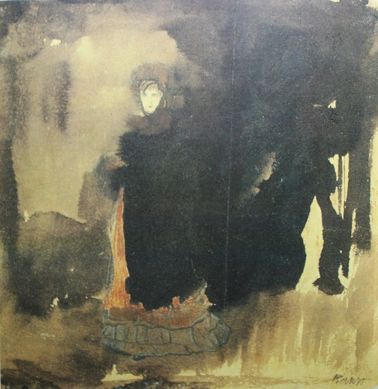 Бакст Лев. Иллюстрация к стихотворению А.А.Блока «Незнакомка». 1907. Бумага, графитный карандаш, акварель 18,3х17,7 Государственная Третьяковская галерея